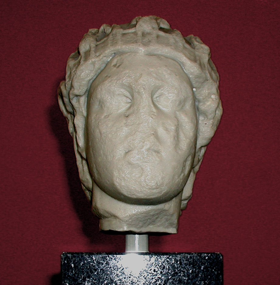 Athena-Parthenos, Kopie eines Fundes Köln-Neumarkt